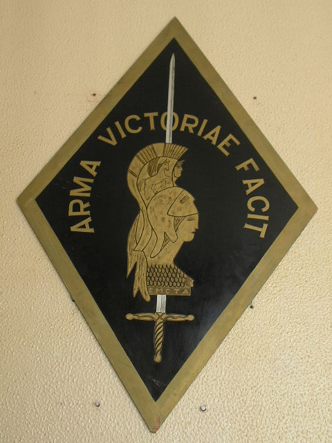 Insigne de l'Ecole Militaire du Corps Technique et Administratif